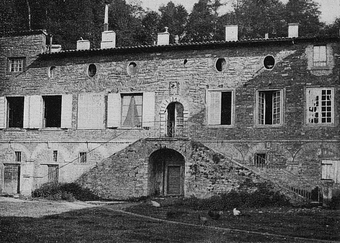 Dictionnaire illustré des communes du département du Rhône. Tome 1 / par MM. E. de Rolland et D. Clouzet.